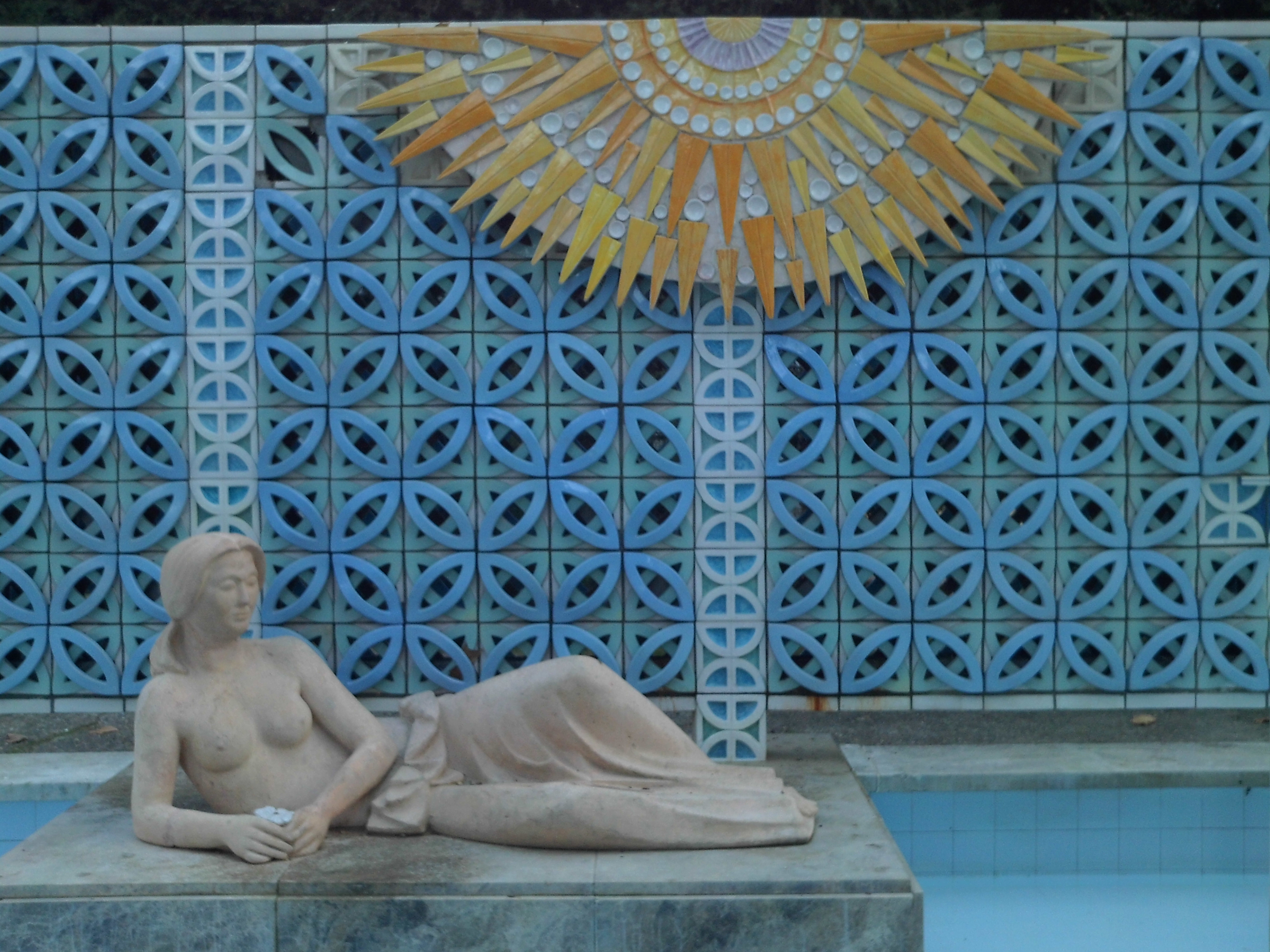 Estatua de una mujer en la glorieta de Luis Montoto. Parque de María Luisa, Sevilla, España.